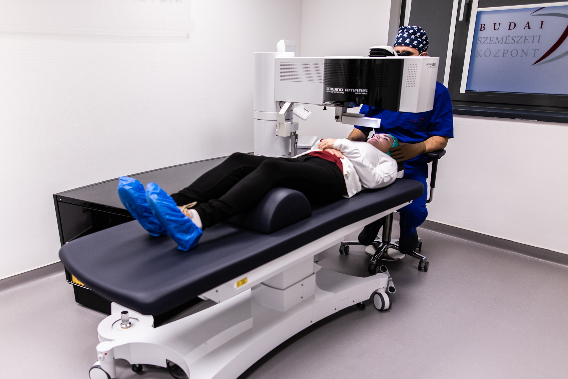 Az operatőr a lézeres szemműtét előtt az excimer lézerhez tartozó ágyon fekvő páciens fejét pozícionálja a kezeléshez. A fájl által ábrázolt elemek: Schwind Amaris 1050RS excimer lézer és a hozzá tartozó ágy. Helyszín: Budai Szemészeti Központ, 1126 Budapest, Tartsay Vilmos utca 14.